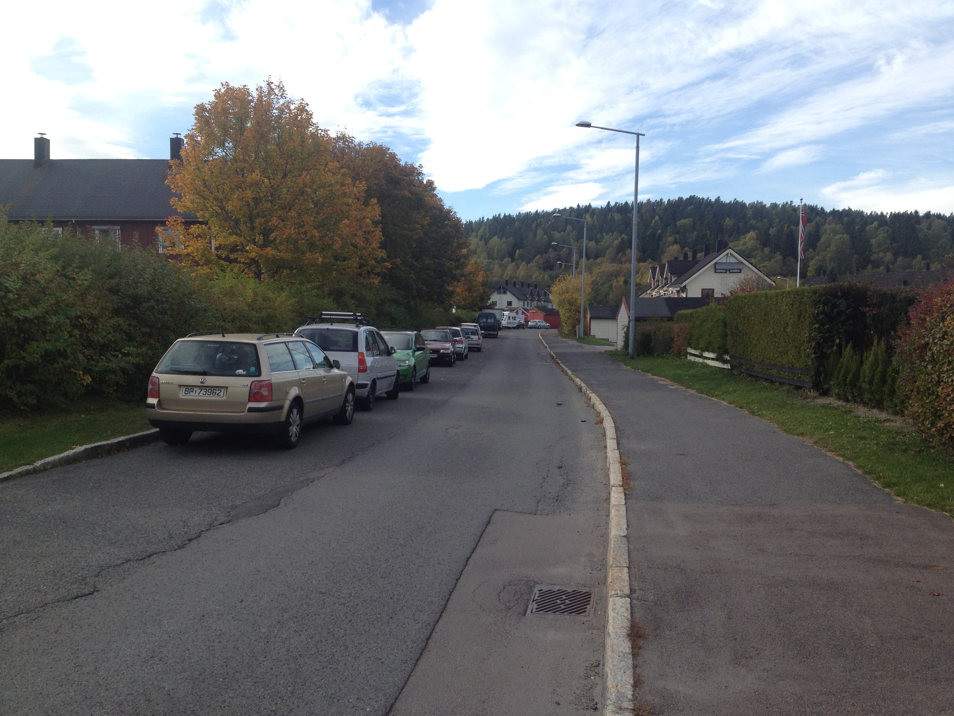 Munkebekken på Ellingsrud.